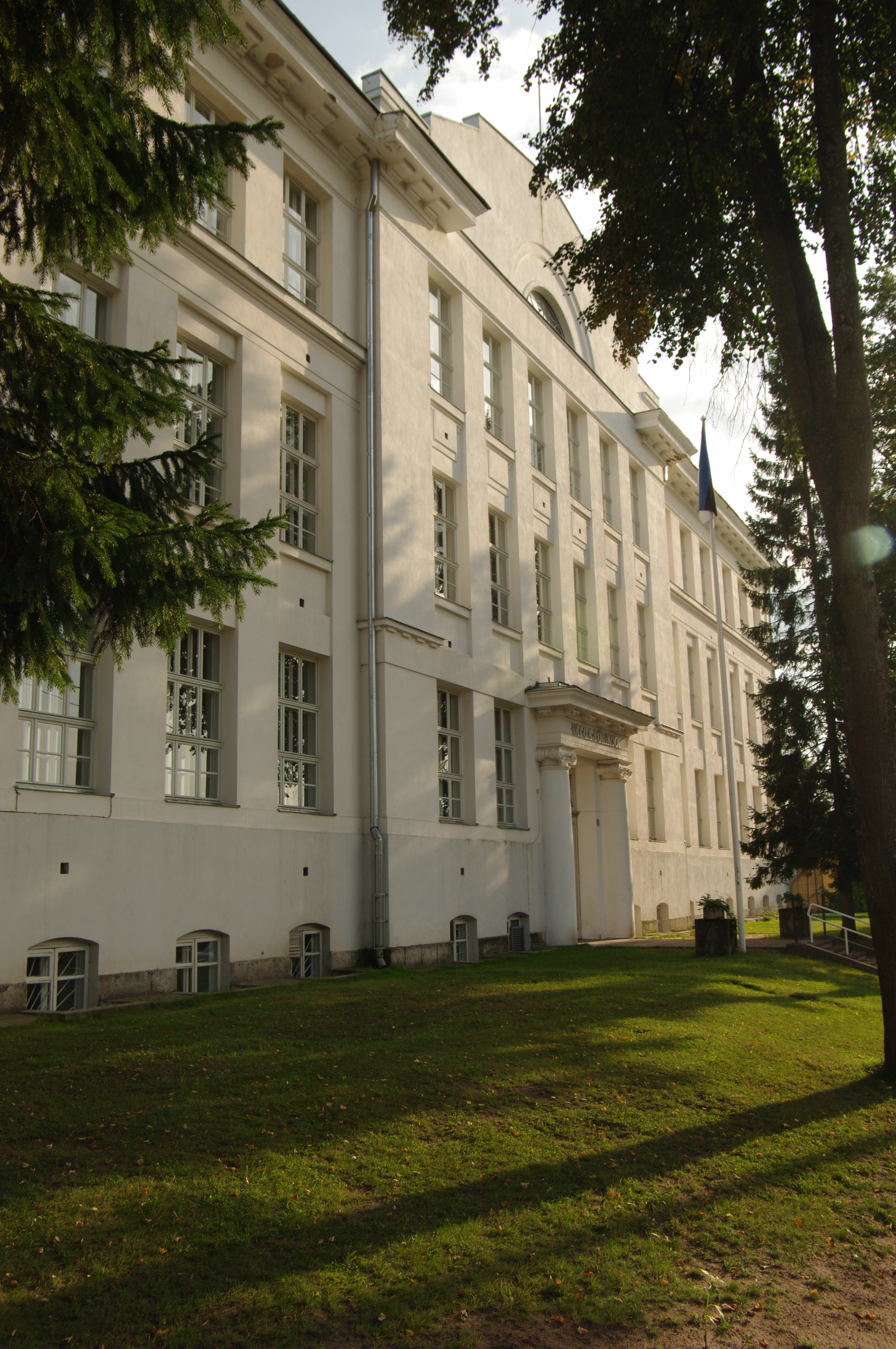 Ehitatud 1915 Reaalkooli hooneks,arh. A.Kieselbasch. I MS-I tõttu kasutati sõjaväehaiglana. Sõja järel 1923 läks Poeglaste Gümnaasiumi käsutusse. Praegu kasutab hoonet Valga 2. Põhikool